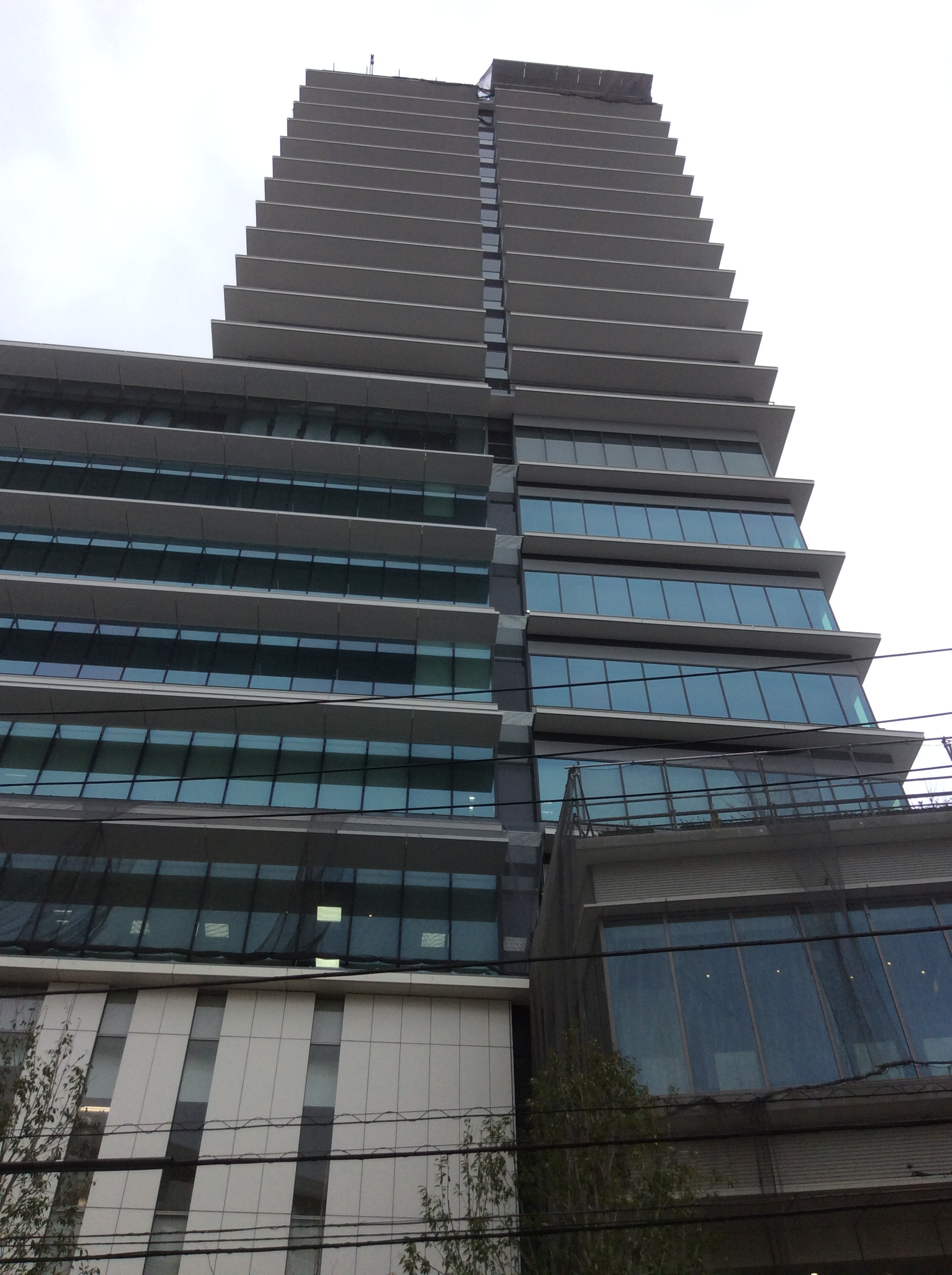 （2015年3月撮影）